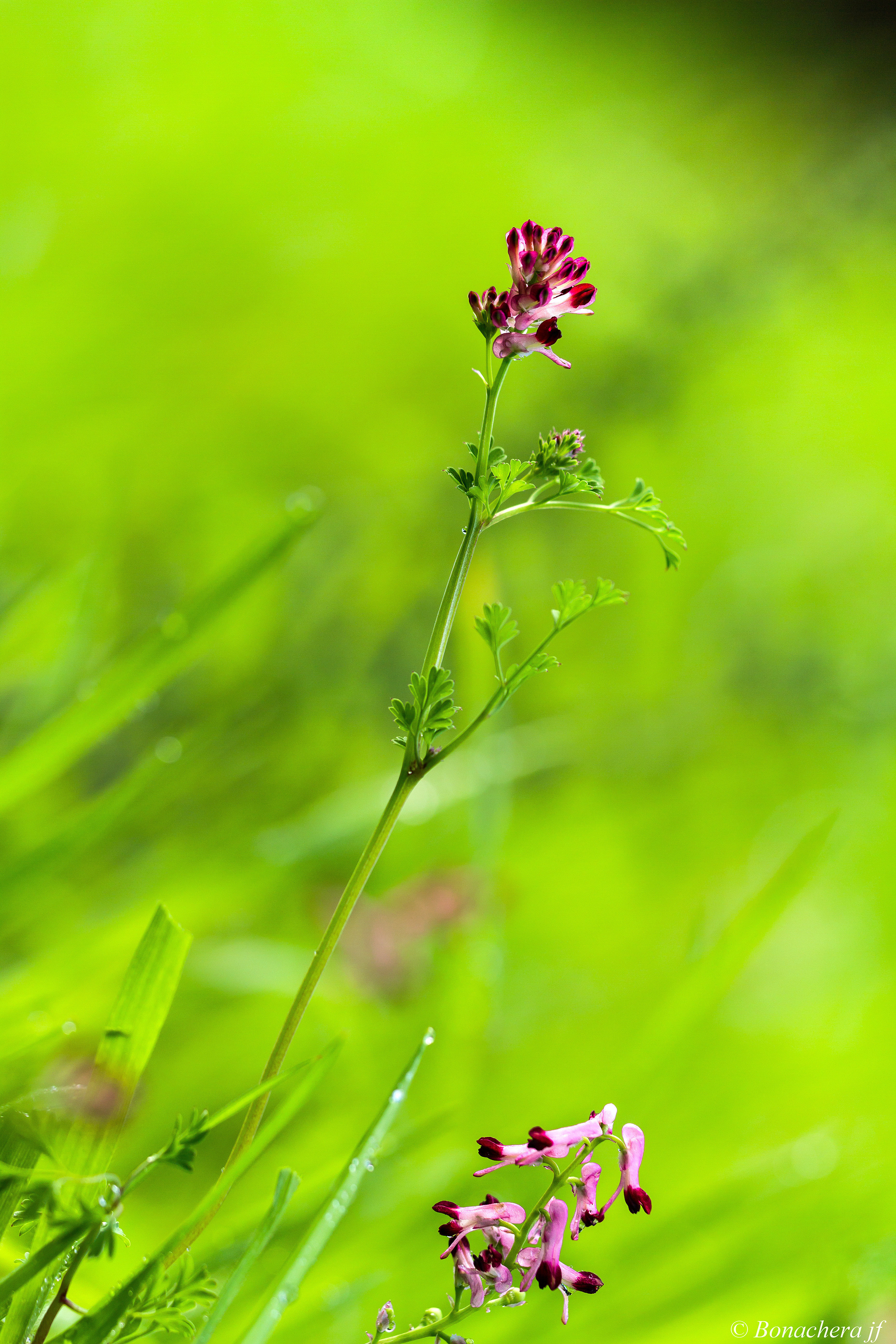 Fumaria officinalis L.